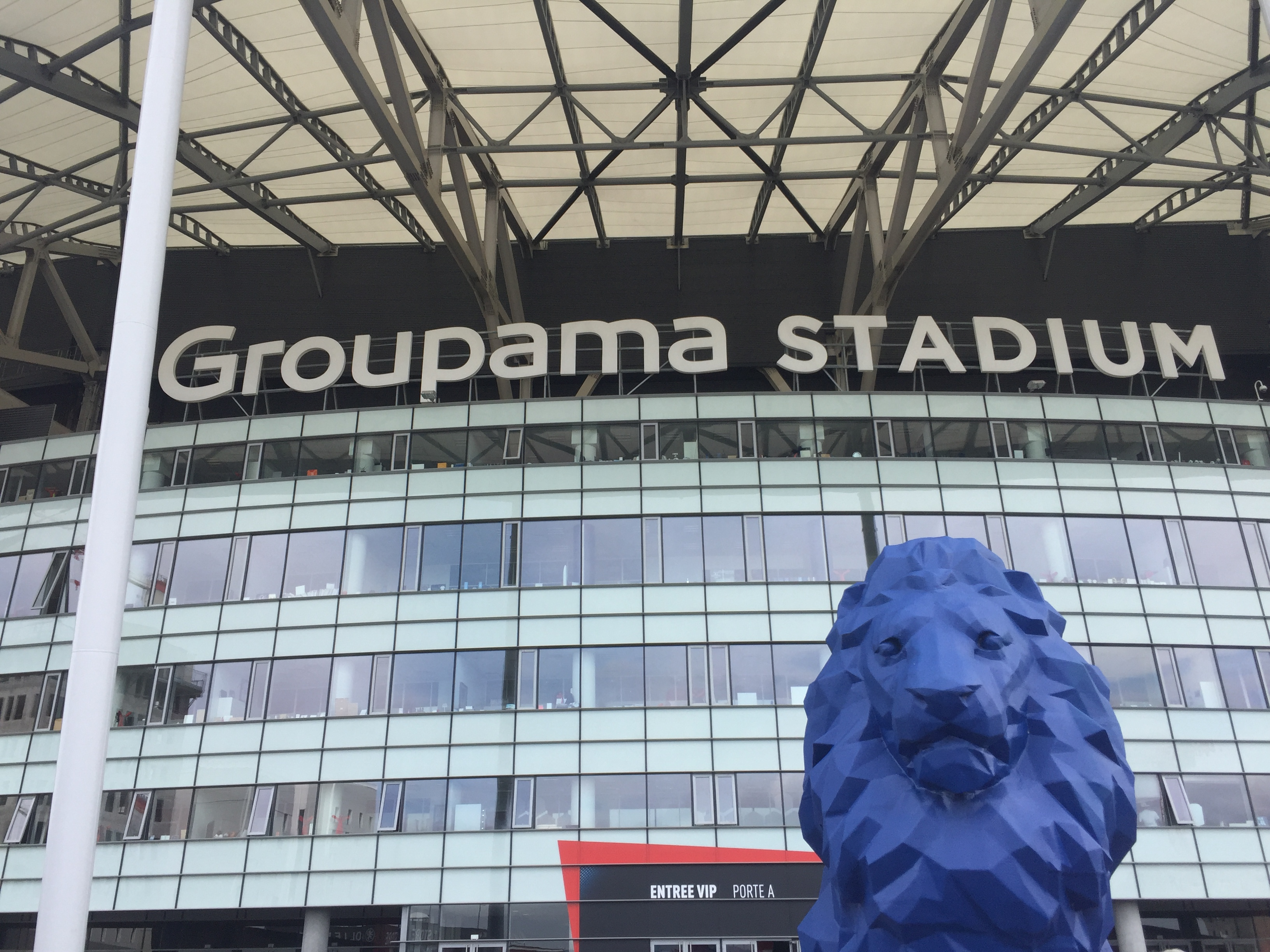 Groupama Stadium